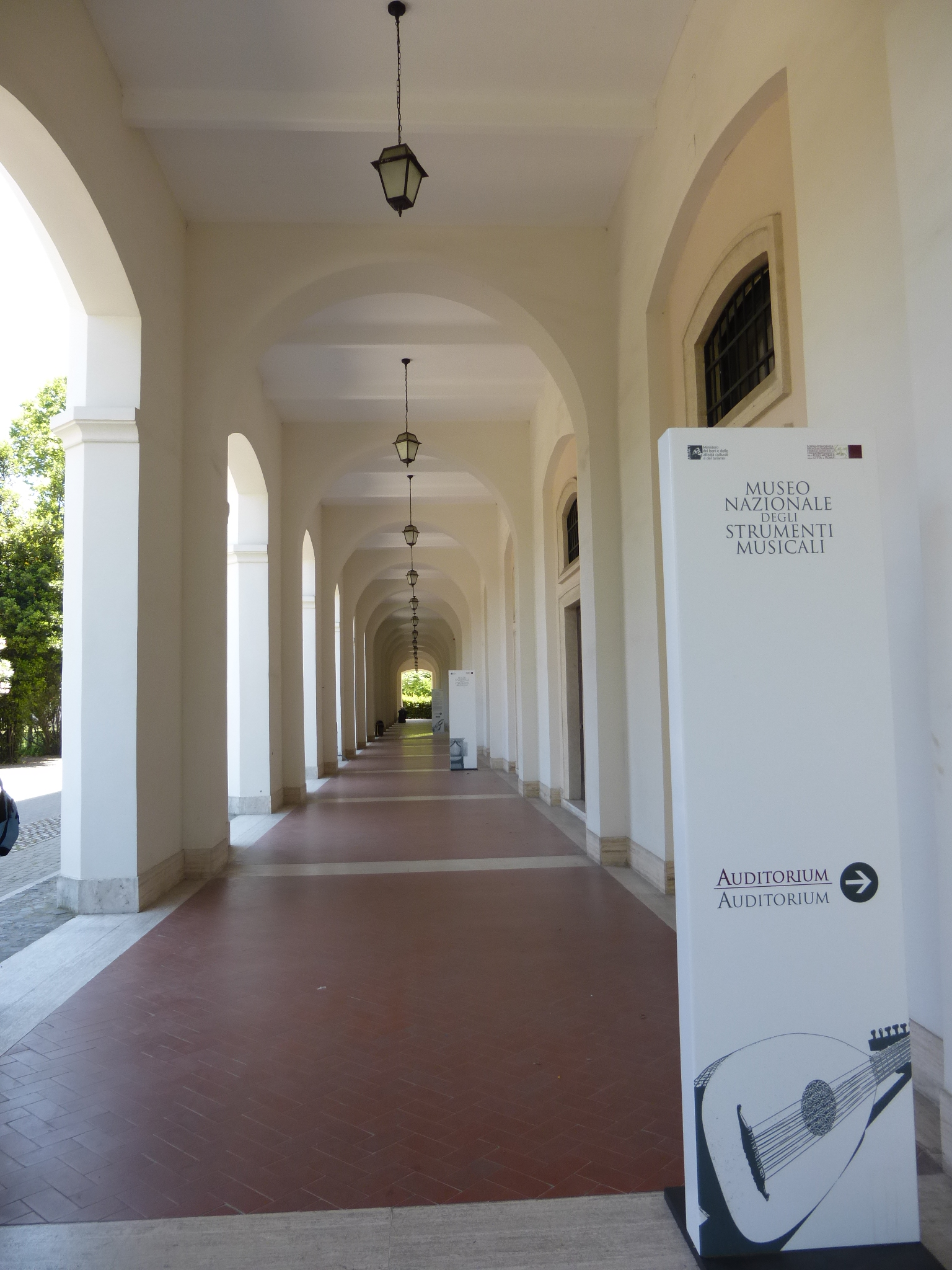 Roma, Museo nazionale degli strumenti musicali, portico d'ingresso.